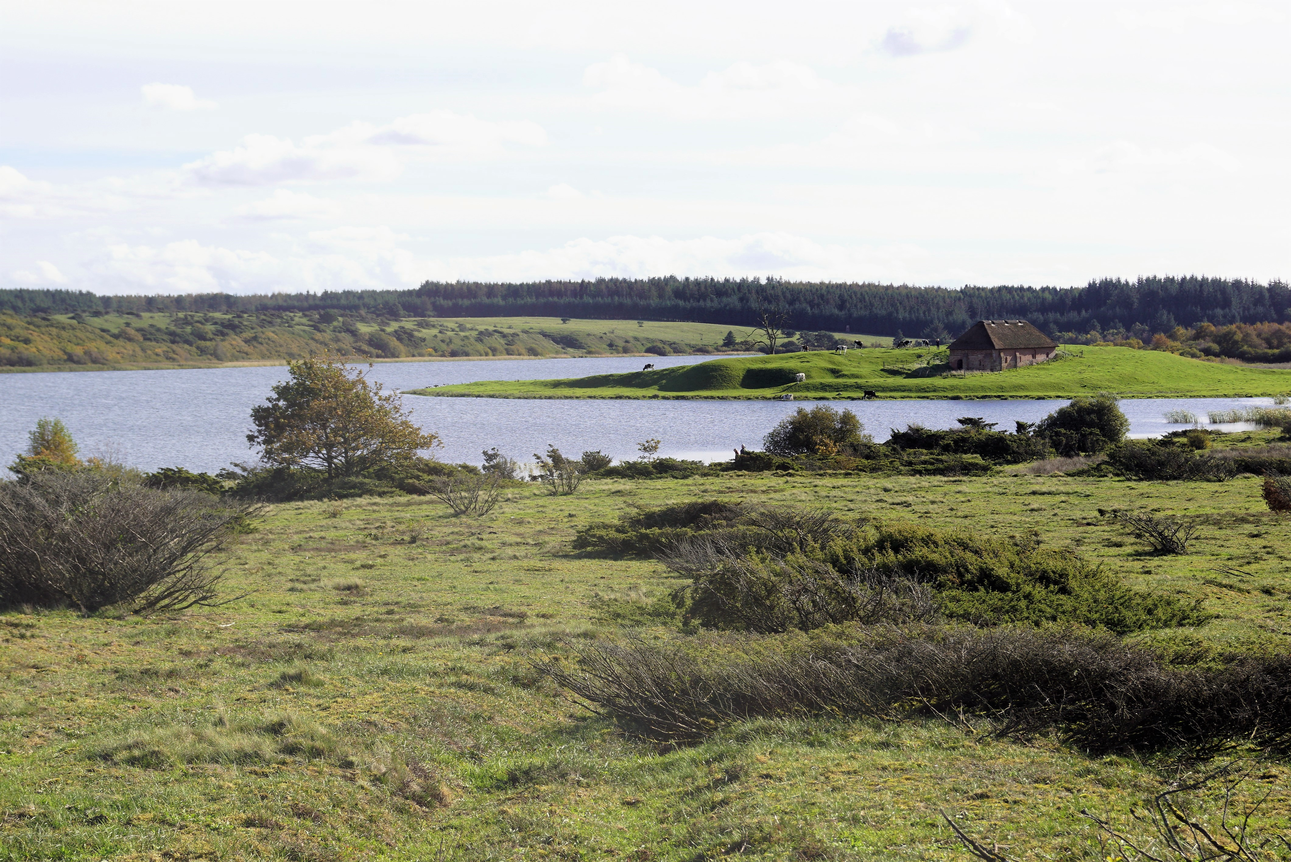 Stubbergård Sø og Stubber Kloster